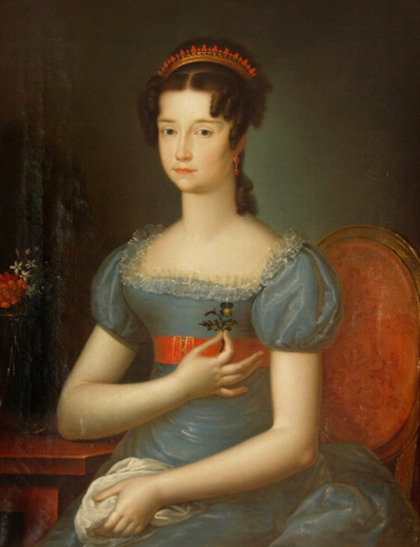 Ritratto di Maria Teresa di Savoia (1803 - 1879), figlia di Vittorio Emanuele I e gemella di Maria Anna